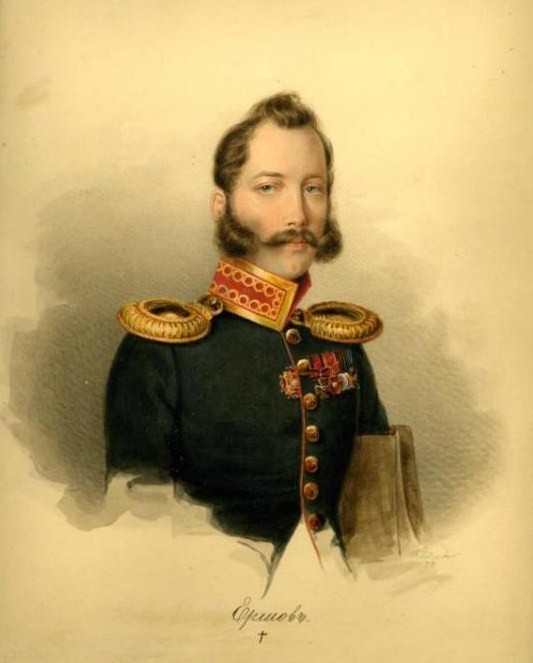 Ершов, Иван Захарович (1806—1864).